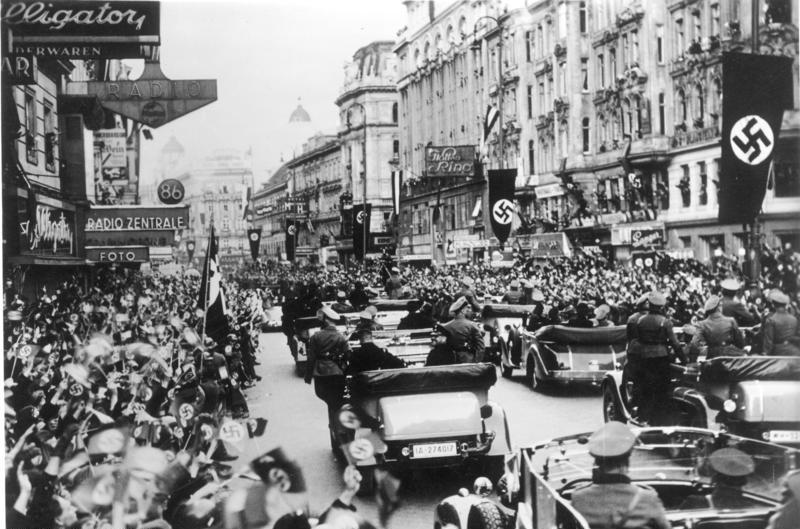 This description has been identified as biased or incorrect: Original Nazi-propaganda descriptionDes Führers Triumphfahrt durch das jubelnde Wien. Die Ankunft des Führers in Wien am Montagnachmittag gestaltete sich zu einem triumphalen Einzug, wie ihn wohl noch kein Staatsmann erlebte. Hunderttausende umsäumten viele Stunden vor der Ankunft der Wagenkolonne des Führers die Strassen und ihre Jubelrufe klangen dem Einiger aller Deutschen wie ein Orkan entgegen. 15.3.1938 [Herausgabedatum] Scherl Bilderdienst, Berlin Information added by Wikimedia users.